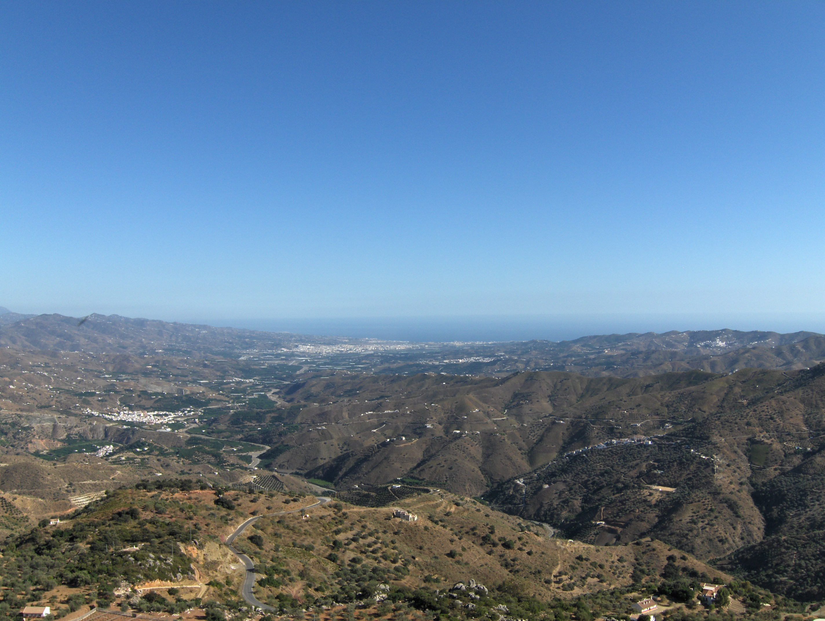 Valle del río Vélez, Málaga, España.